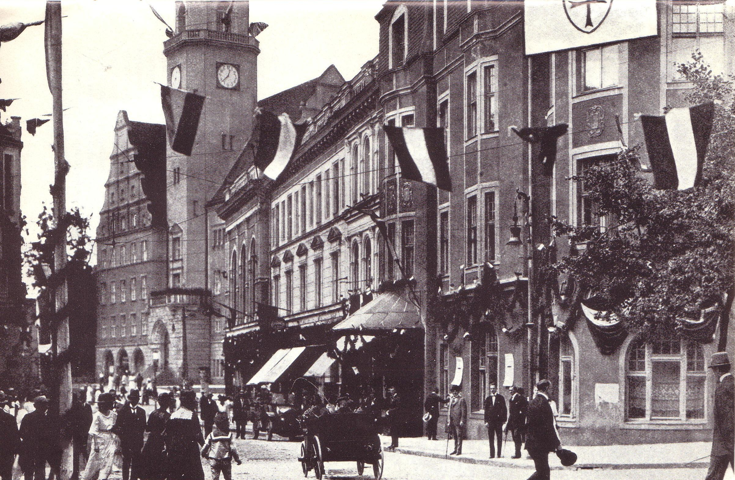 Das Deutsche Haus in Allenstein, Hauptquartier des Heimatdienstes während der Abstimmungswoche im Juli 1920